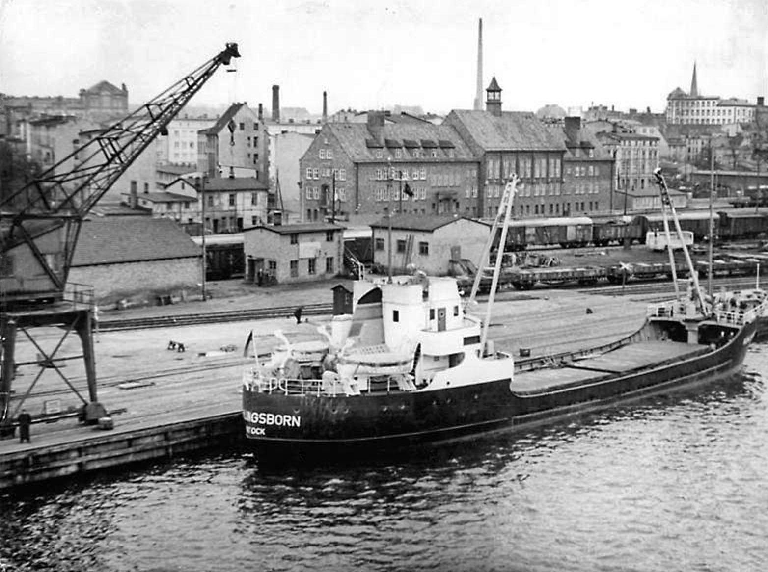 Rostock, Hafen, Frachter, Sozialgebäude der Hafenarbeiter Zentralbild Löwe 23.3.1957 Ho.- Reger Betrieb im Hafen von Rostock. Das Küstenmotorschiff der Deutschen Seereederei "Kühlungsborn"ladet Kali für Plymouth und Exmonth (England). Im Hintergrund das Sozialgebäude der Hafenarbeiter.